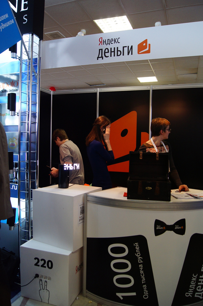 Стенд Яндекс.Денег на РИФе